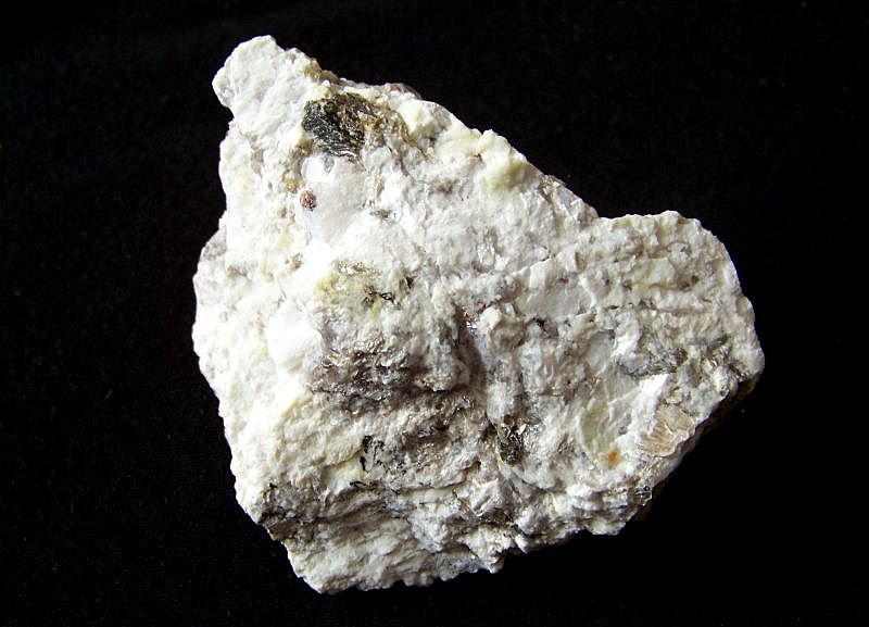 Pegmatyt hybrydalny (desilifikowany) z kopalni magnezytu w Witach na Dolnym Śląsku. Widoczne czerwone granaty.